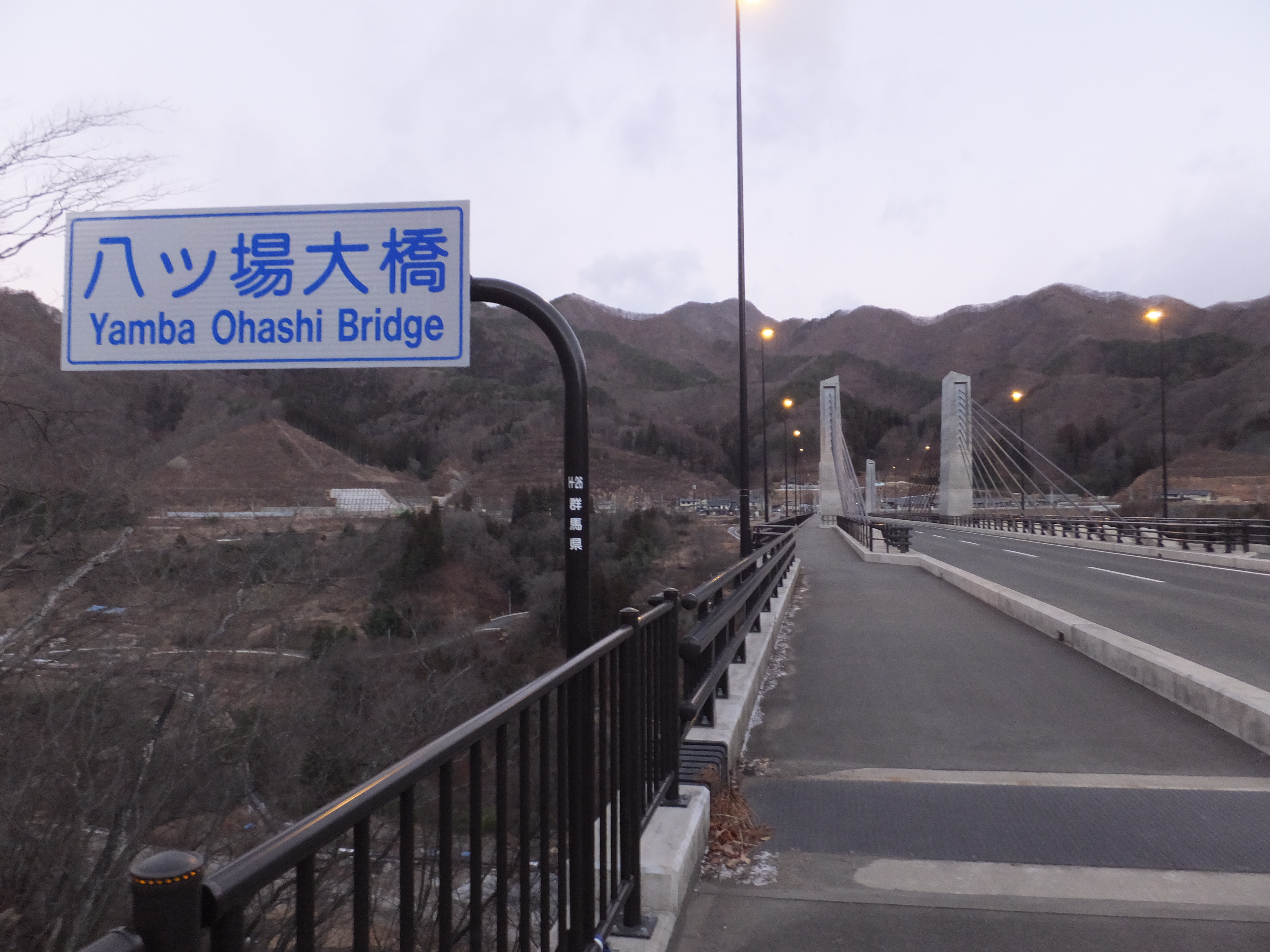 八ッ場大橋 川原湯側 2016年12月